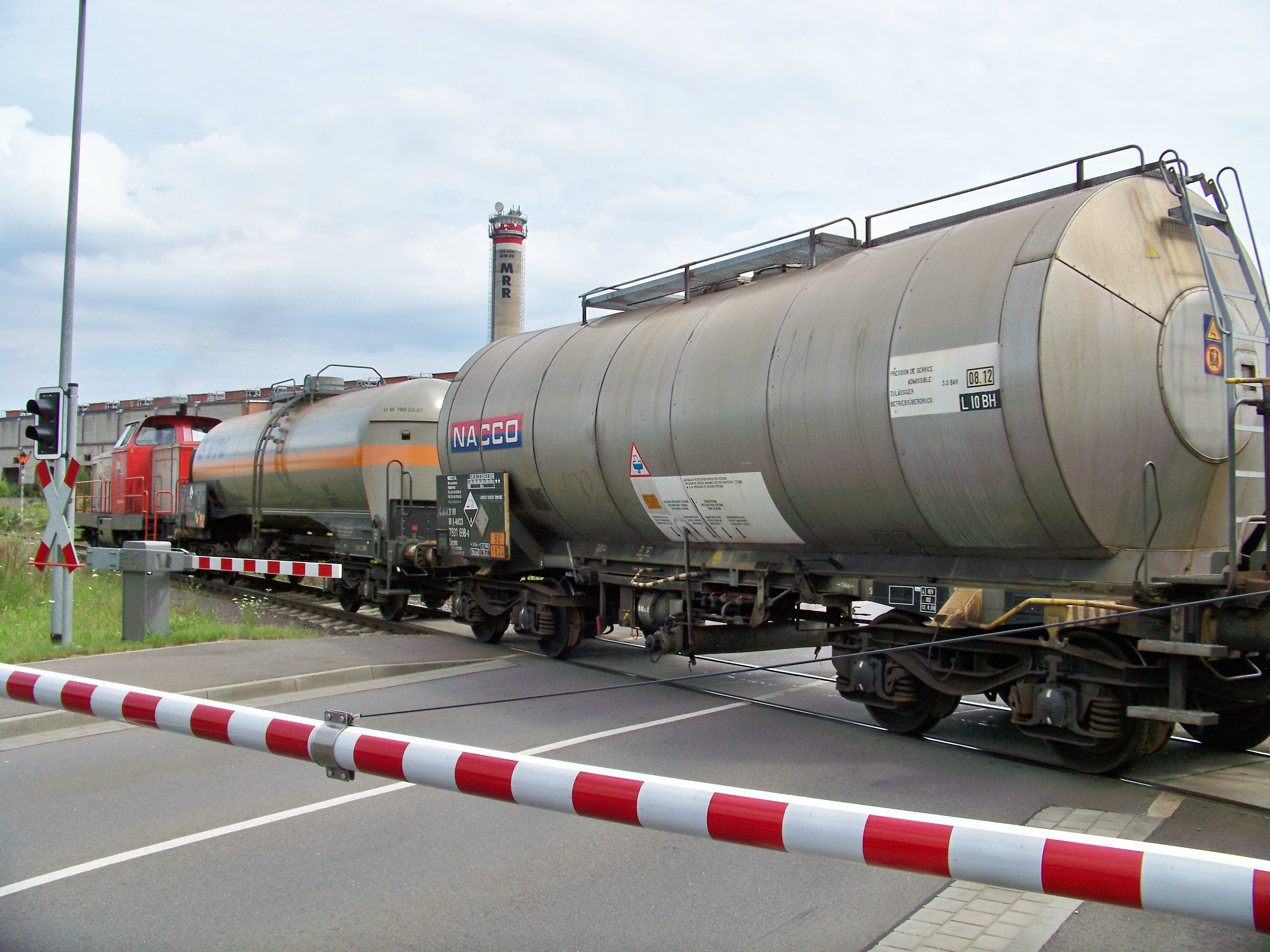 Werkbahnverkehr im Chemiepark Bitterfeld-Wolfen (Parsevalstraße)